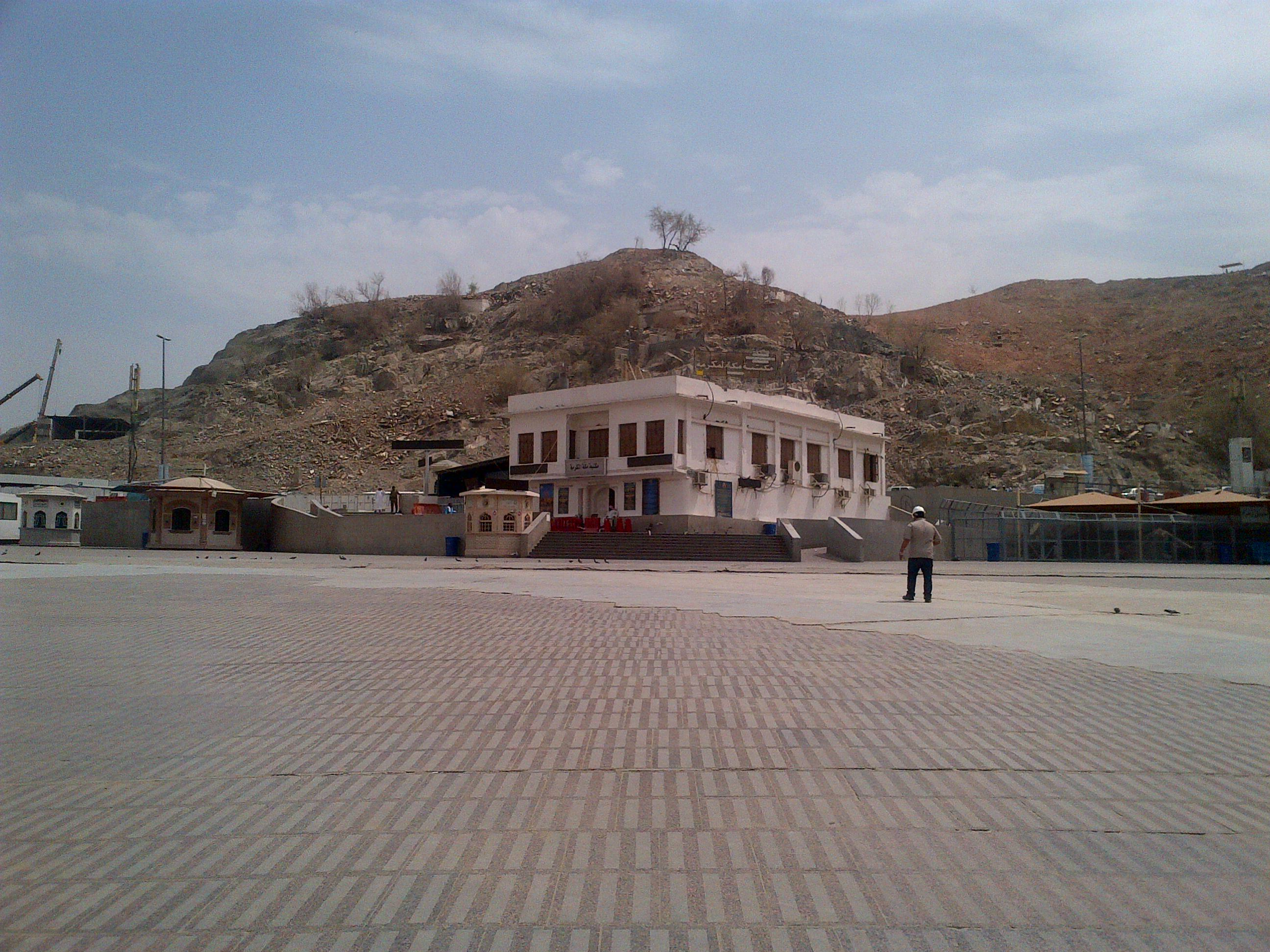 Perpustakaan Makkah al-Mukarramah terletak di Timur Laut Masjidil Haram